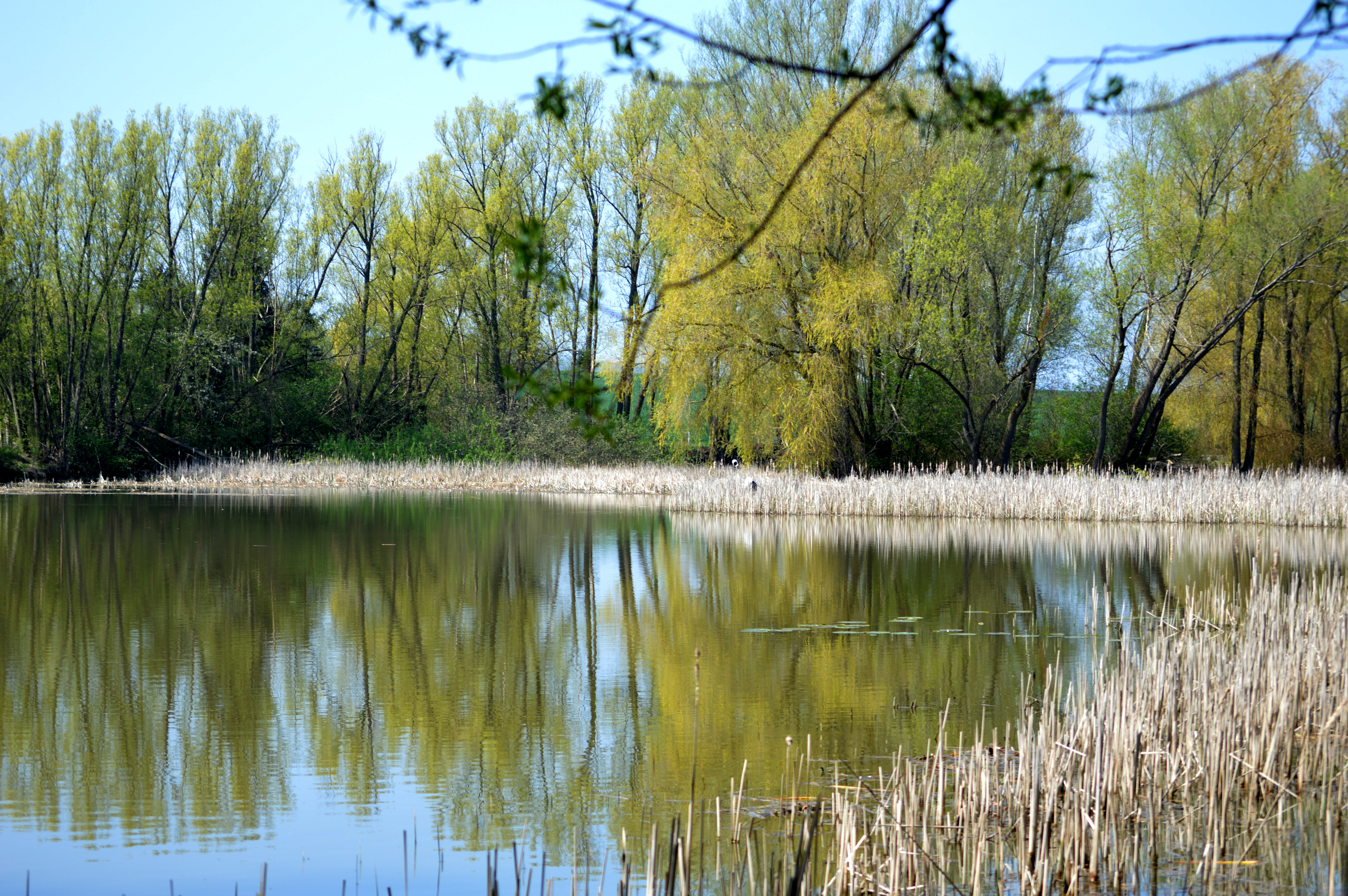 Landschaftsschutzgebiet Röderhofer Teiche und Egenstedter Forst (LSG HI 0028)